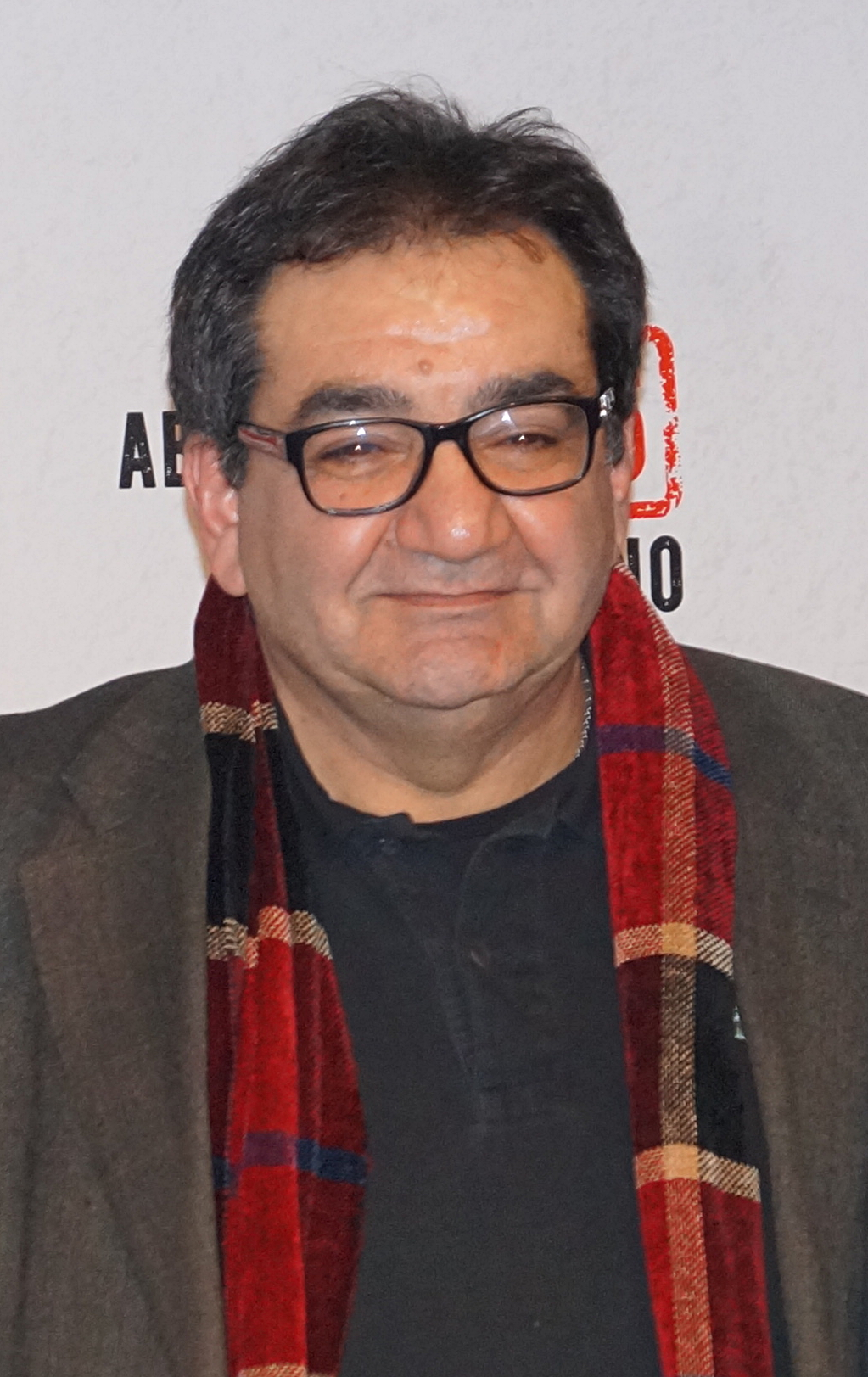 Mohammad-Ali Behboudi bei der Premiere von "300 Worte Deutsch", Januar 2015